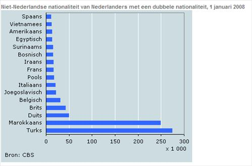 Herkomst van Nederlanders met een dubbele nationaliteit in Nederland, 2008